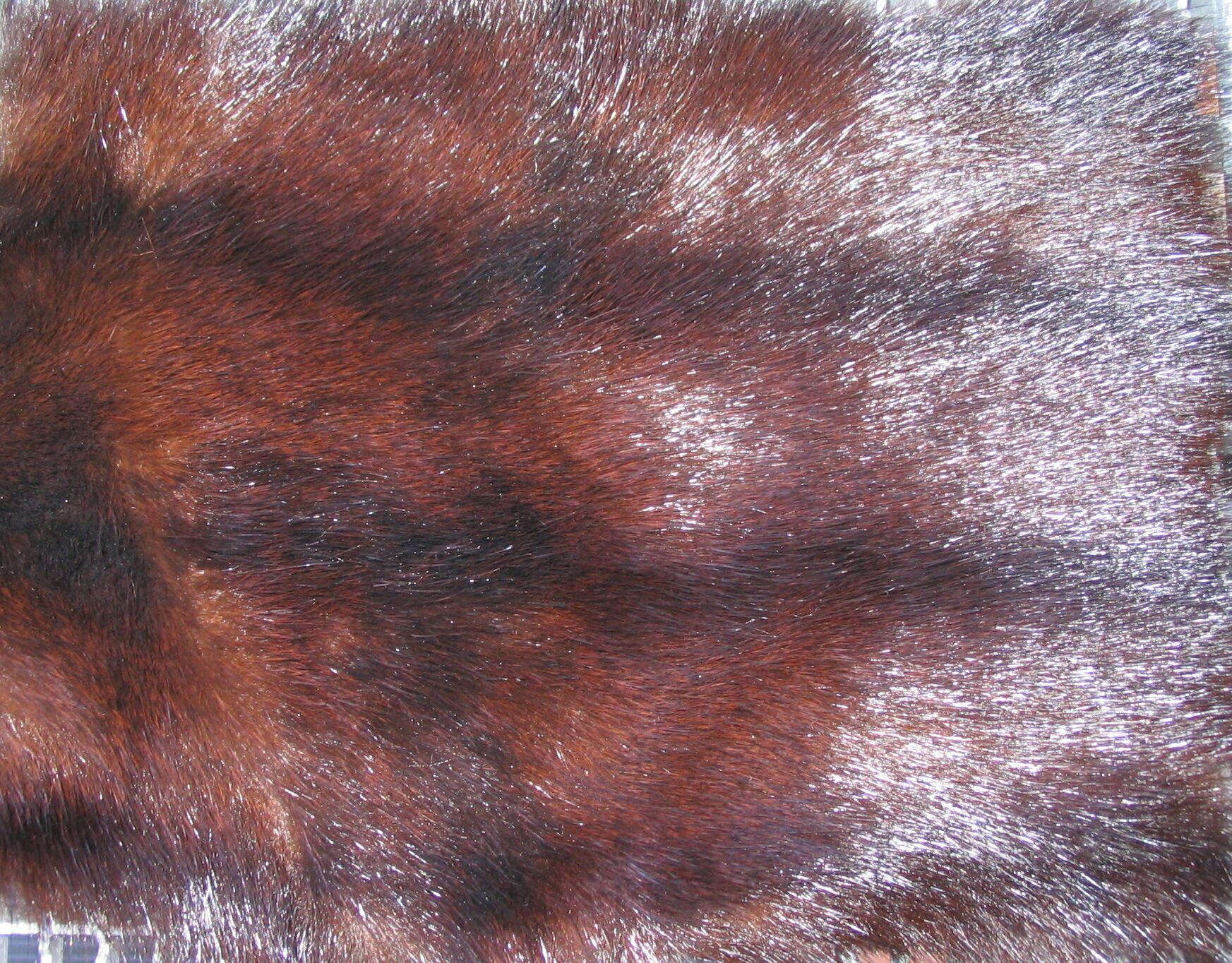 Mink-dyed marmot fur-skin